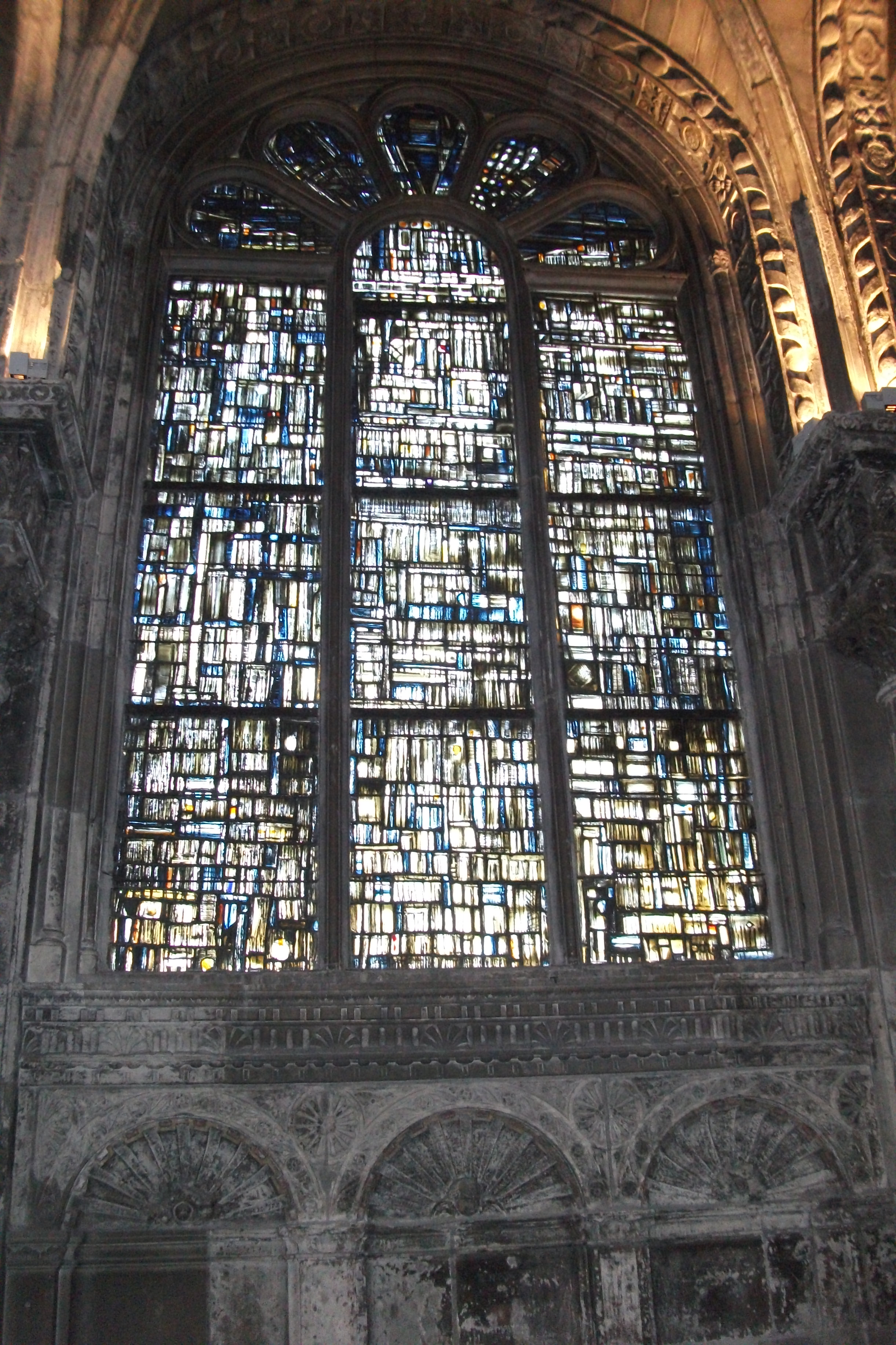 Église_St-Jacques_de Reims. Vitrail de Maria Elena Vieira da Silva, travail entre 1966 et 1976.